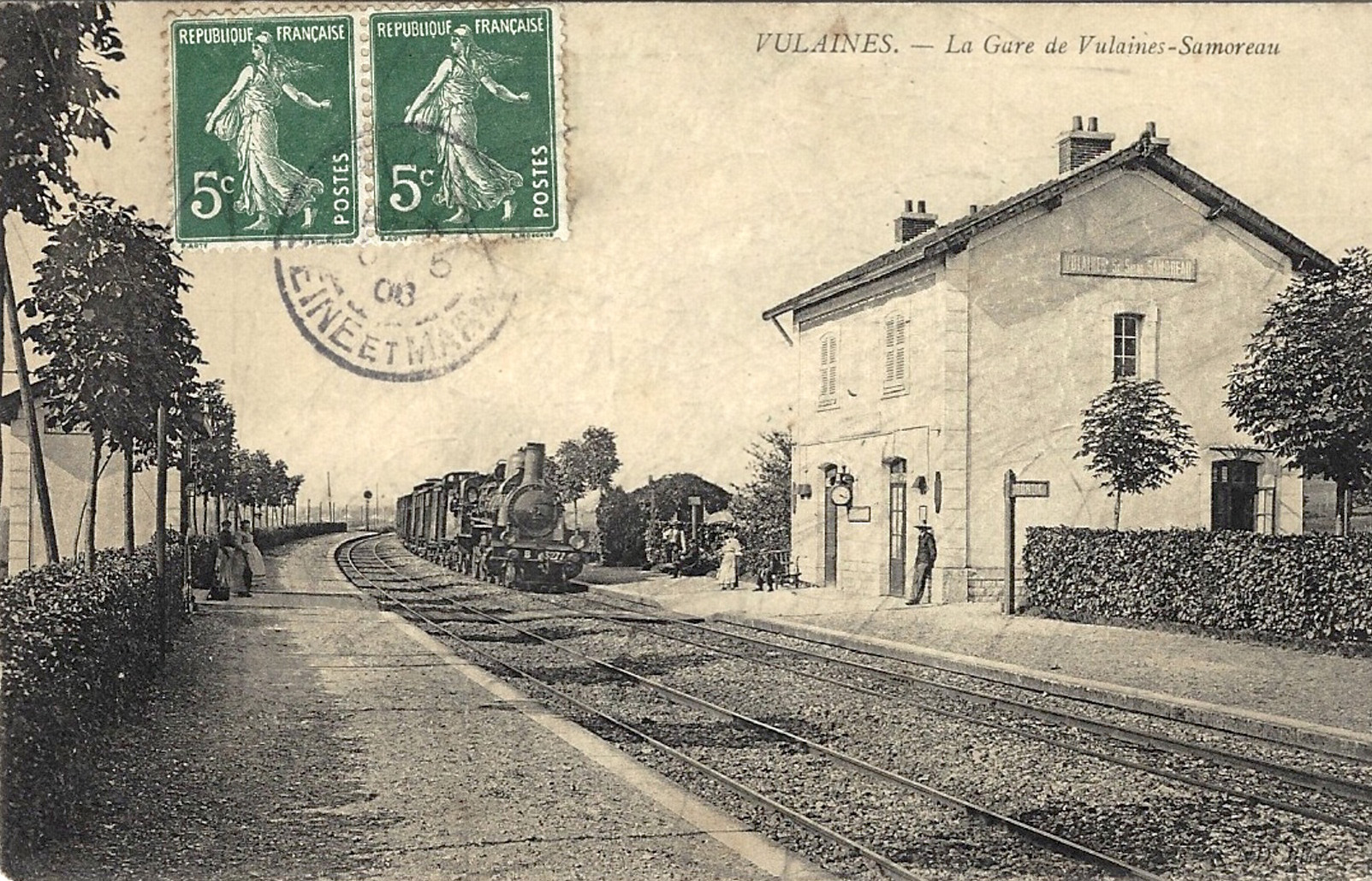 Gare ferroviaire de Vulaines–Samoreau sur une carte postale vers 1908